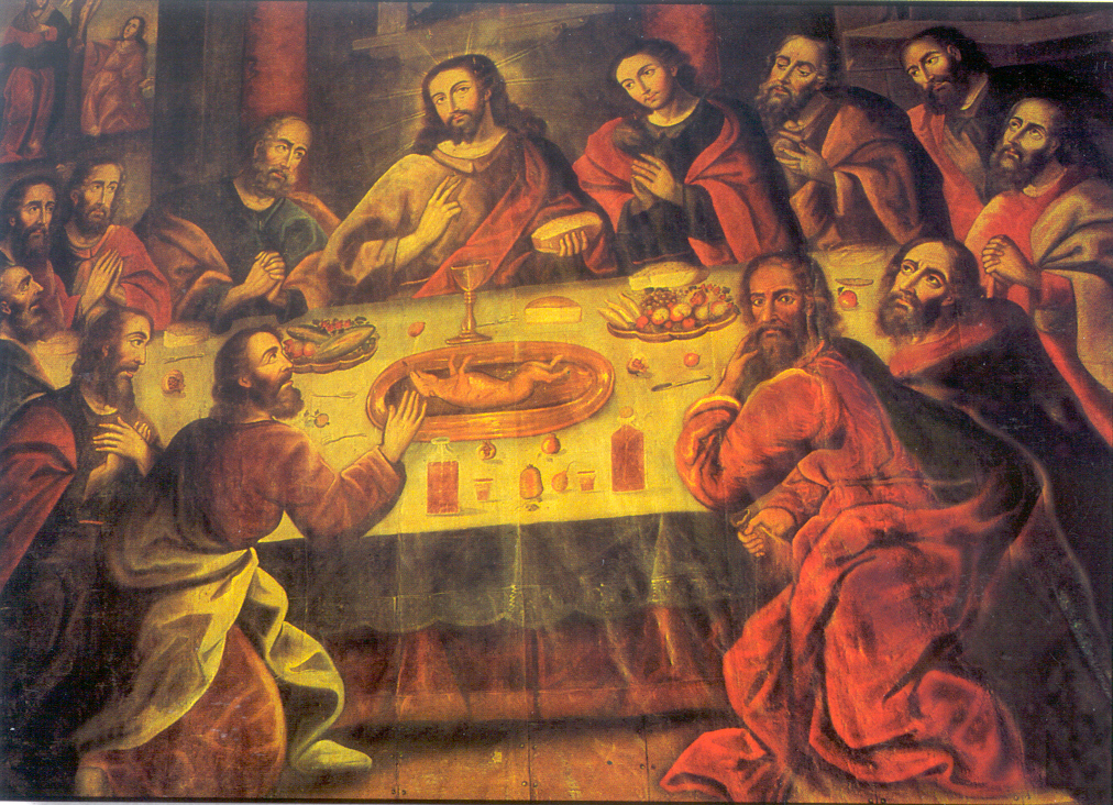 La Última Cena